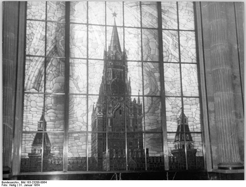 Berlin, Sowjetische Botschaft, Buntglasfenster Zentralbild Heilig Hei-Schü-31.1.1954 Die Beratungen der vier Aussenminister werden am 1.Februar 1954 in dem Gebäude des Hohen Kommisars der UdSSR in Deutschland im demokratischen Sektor von Groß-Berlin,Unter den Linden, fortgesetzt.UBz: Der grosse Beratungstisch.